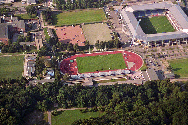 Rostocker Ostseestadion und Leichtathletikstadion